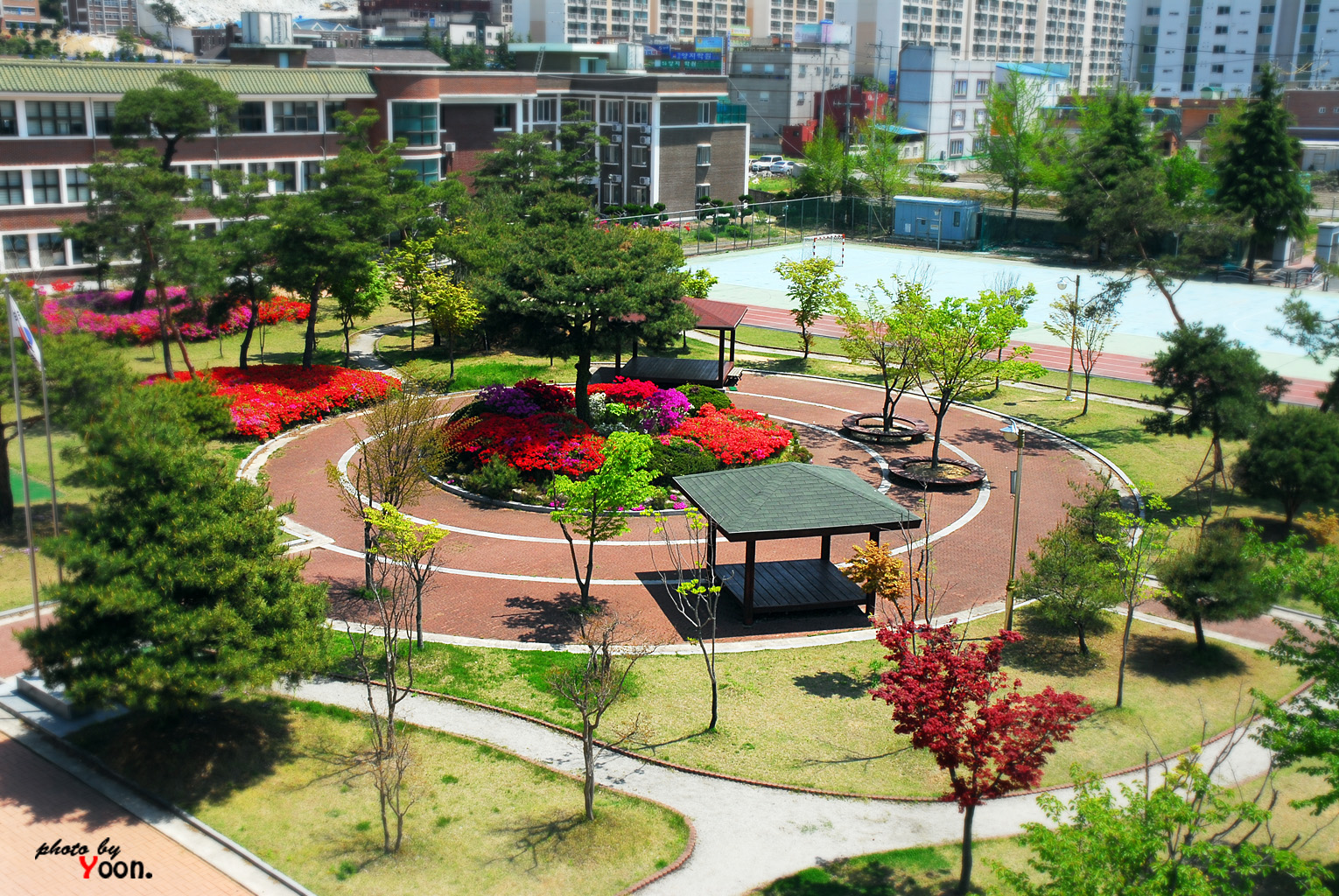 정읍여고의 전경